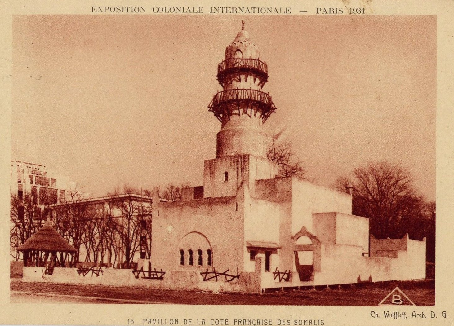 Pavillon de la Côte Française des Somalis à l'Exposition Coloniale de Paris en 1931